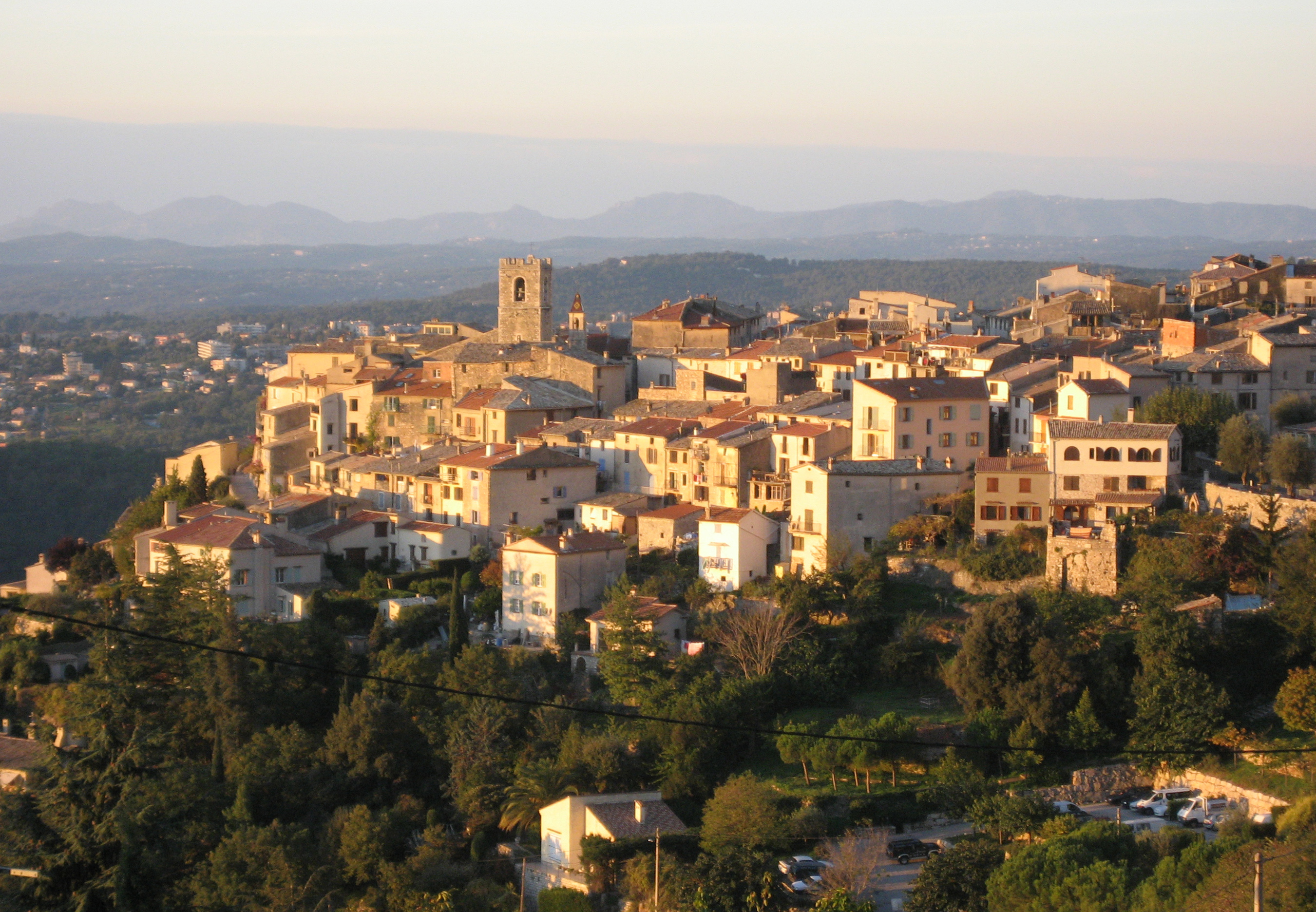 Vue du village de Saint-Jeannet